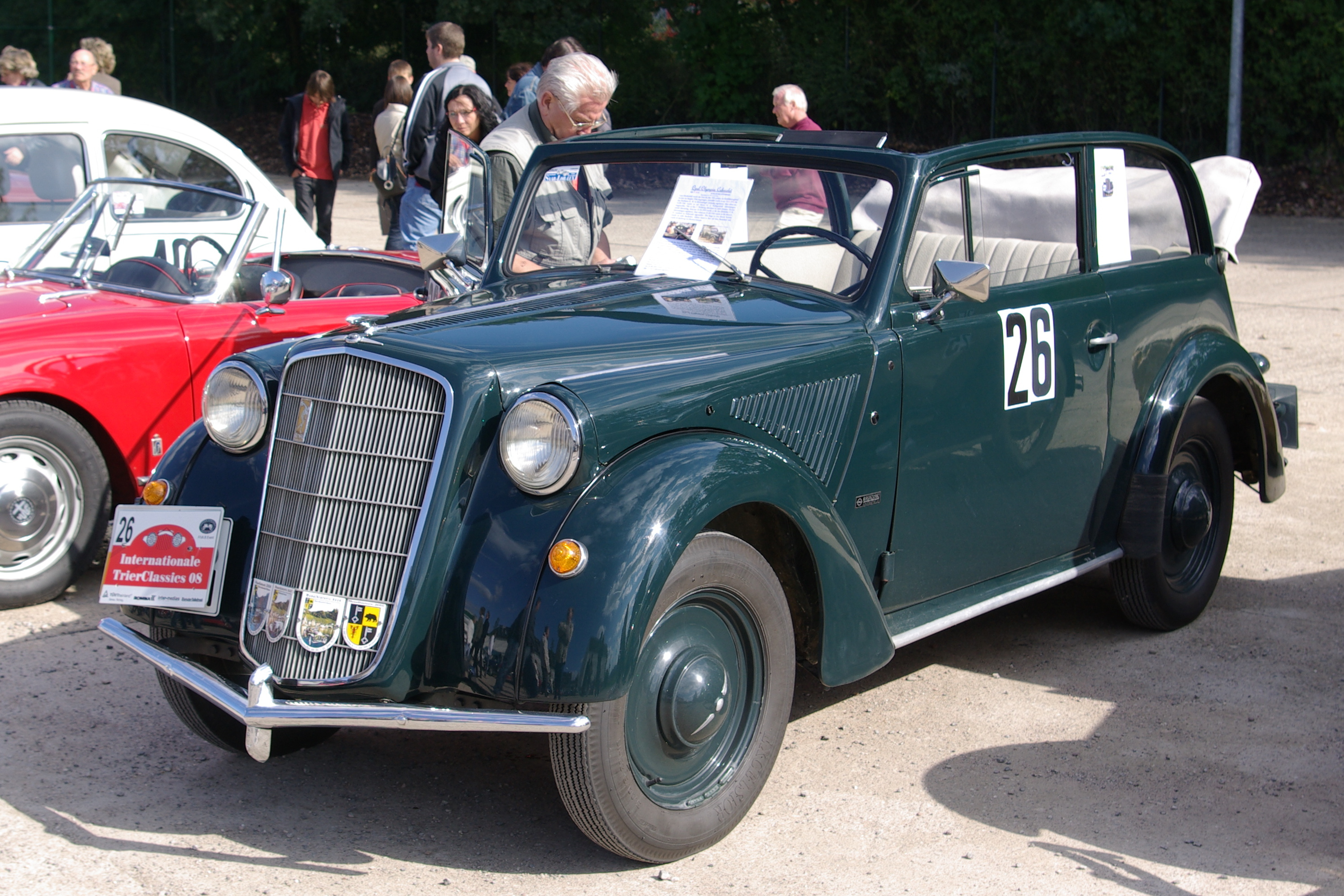 Opel Olympia Baujahr 1936